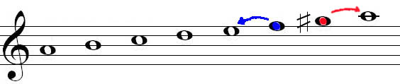 Leittöne der harmomischen a-Moll-Tonleiter